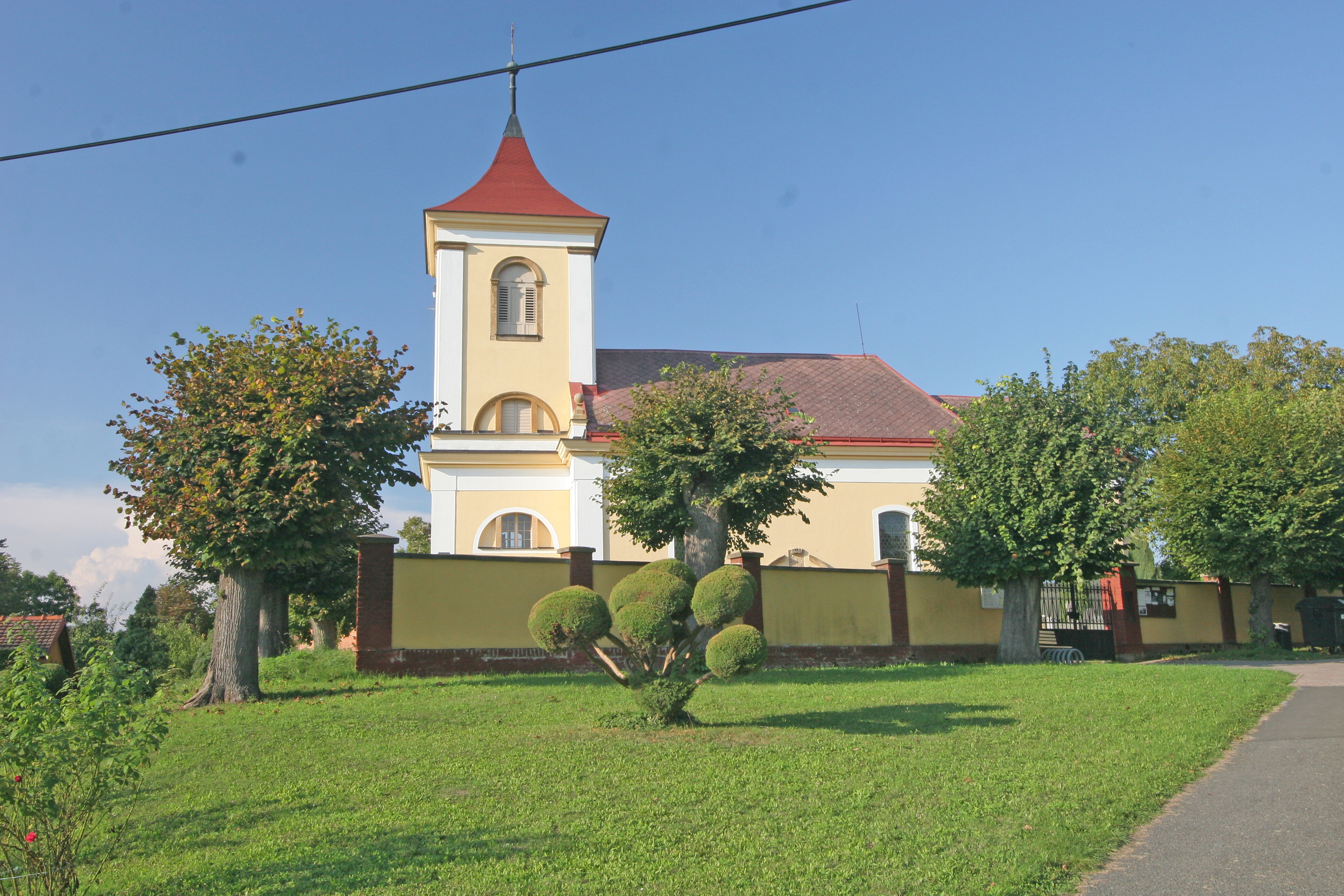 Kostel svatého Justa, Zvole(Rychnovek).